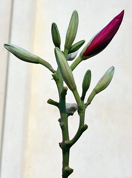 Hong Kong Orchid Tree Bauhinia Blakeana in Kolkata, West Bengal, India.